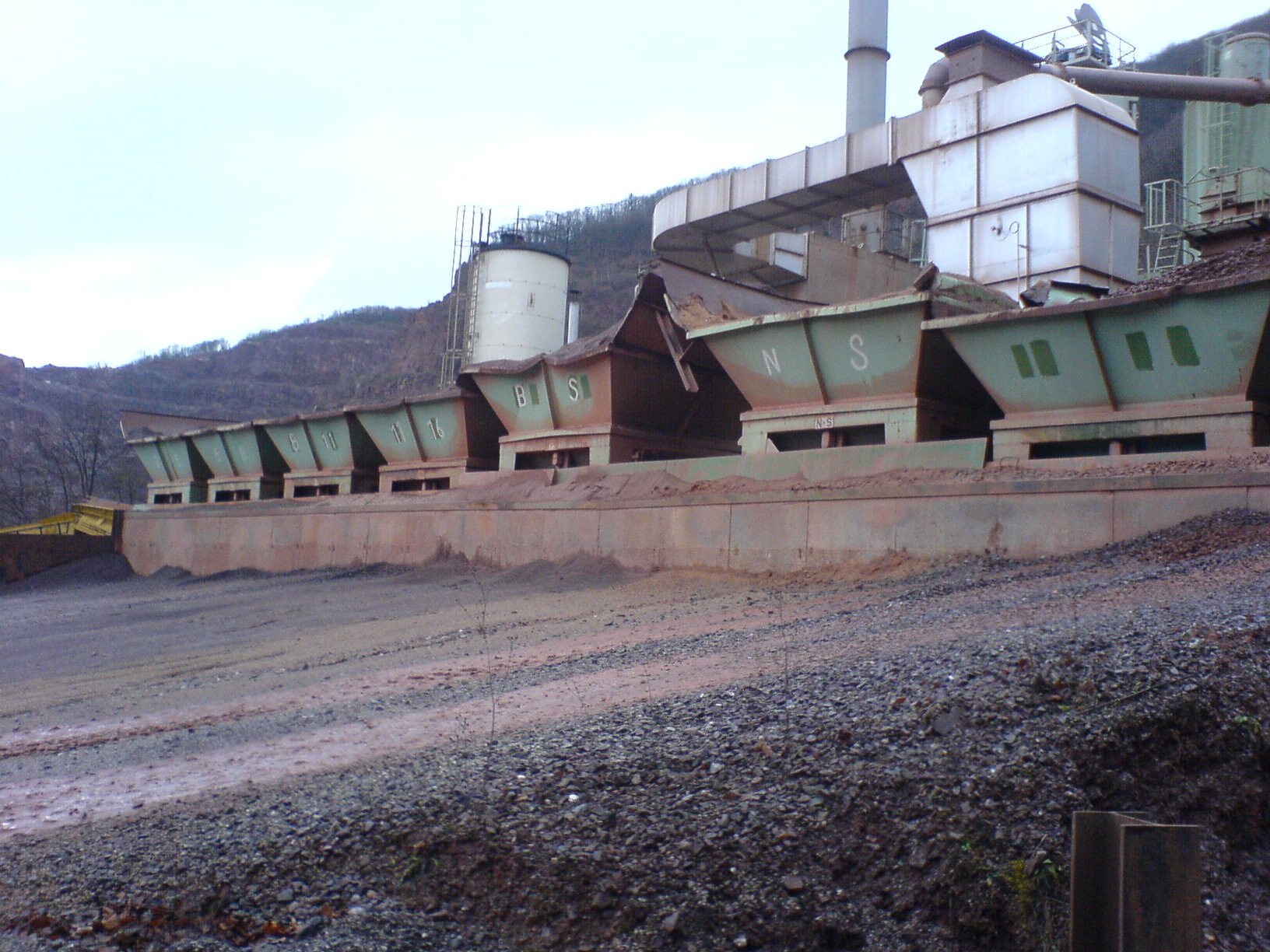 Doseure der Asphaltmischanlage.